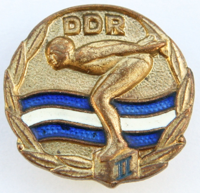 Schwimmabzeichen DDR, Stufe 2, Höhe 20 mm